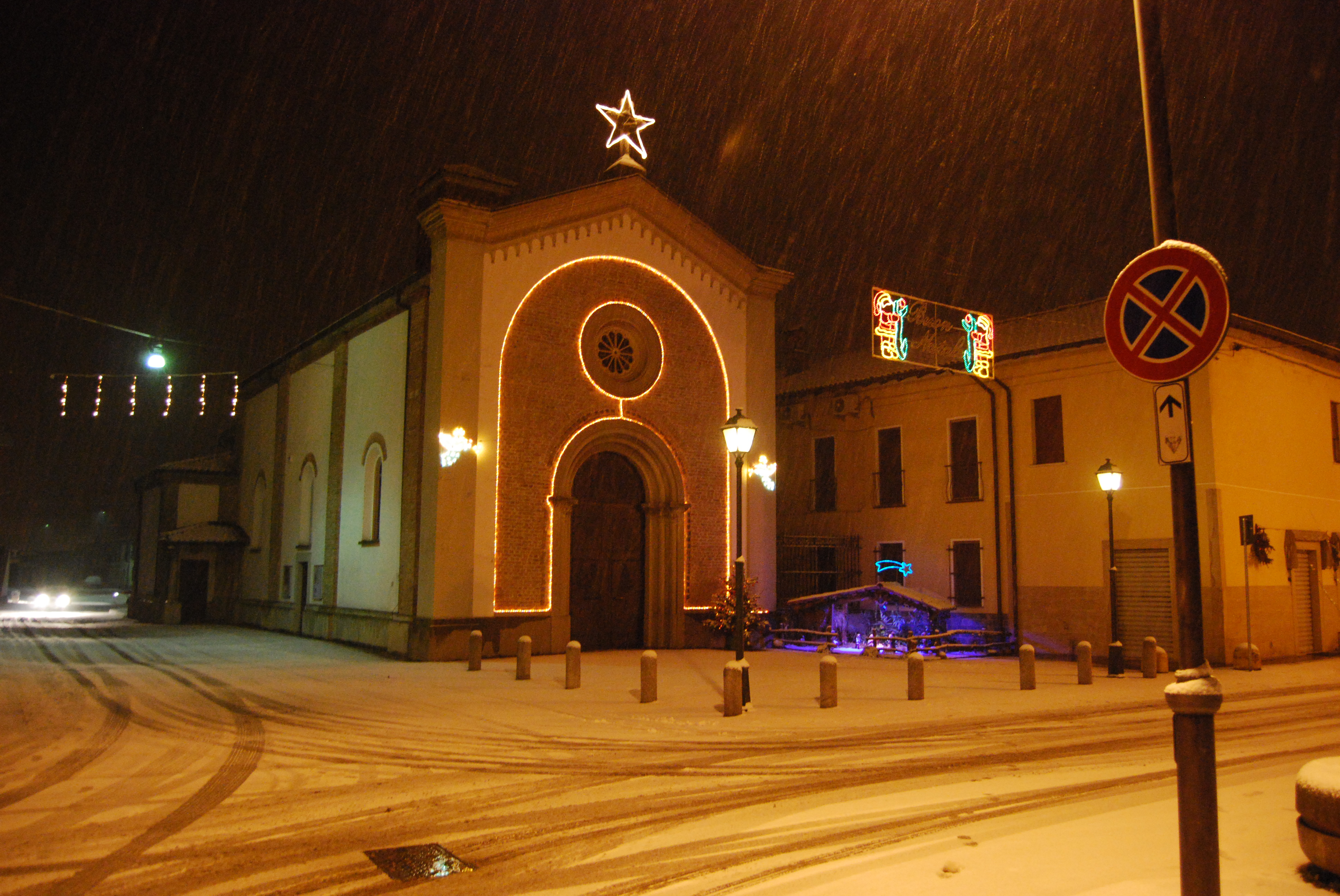 La chiesa parrocchiale di San Pietro Apostolo a Cascine San Pietro, fraz. di Cassano d'Adda